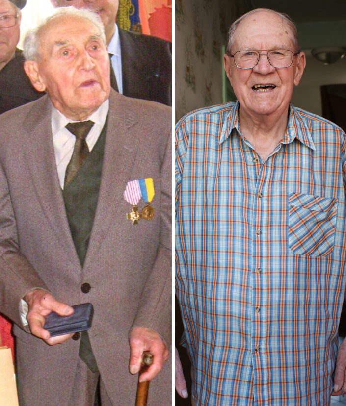 Maurice Neveu, dernier président national de l'Amicale des anciens du 32e RI et 232e RI, avant la dissolution de celle-ci en juin 2012. Il en était membre depuis 32 ans. Décédé à 93 ans à Tours (Saint-Cyr-sur-Loire) en décembre 2012. Ici recevant la médaille de sa ville un mois avant sa disparition. Ayant devancé l'appel, il part avec le 32e RI en 1939, combat près de la Ligne Maginot et en Sarre comme mitrailleur de seconde classe. Julien Loyau, membre de l'Amicale, photographié à Tours (Saint-Cyr-sur-Loire) à son domicile à plus de 96 ans. Engagé à 18 ans au 32e RI, participe à l'intervention en Espagne en 1939 et combat ensuite dans la Sarre jusqu'à la ligne Siegfried, participe à capturer un ennemi, préférant être promu que décoré pour ce fait d'armes, fait prisonnier lui-même et envoyé en Allemagne, il s'évade au bout de 5 ans pour se rendre aux américains plutôt qu'aux russes, fera un carrière militaire, d'abord comme sous-officier jusqu'à 55 ans, puis comme commis administratif, après concours, dans l'intendance jusqu'à 65 ans. Médaillé militaire et décoré de l'Ordre National du mérite, ses amis espèrent pour lui qu'il reçoive enfin la Légion d'Honneur.